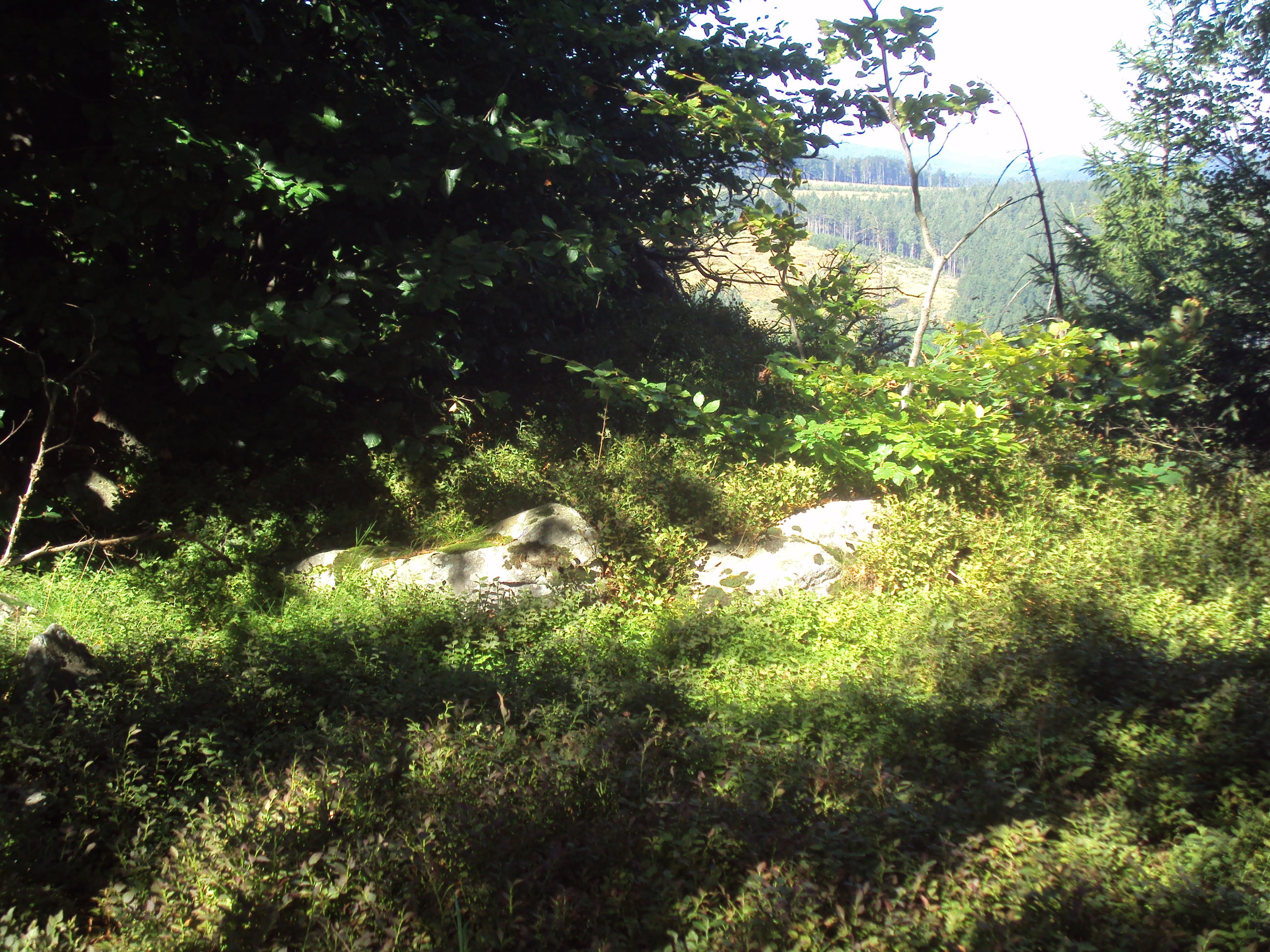 Jižní vrchol Suchého vrchu 638 m